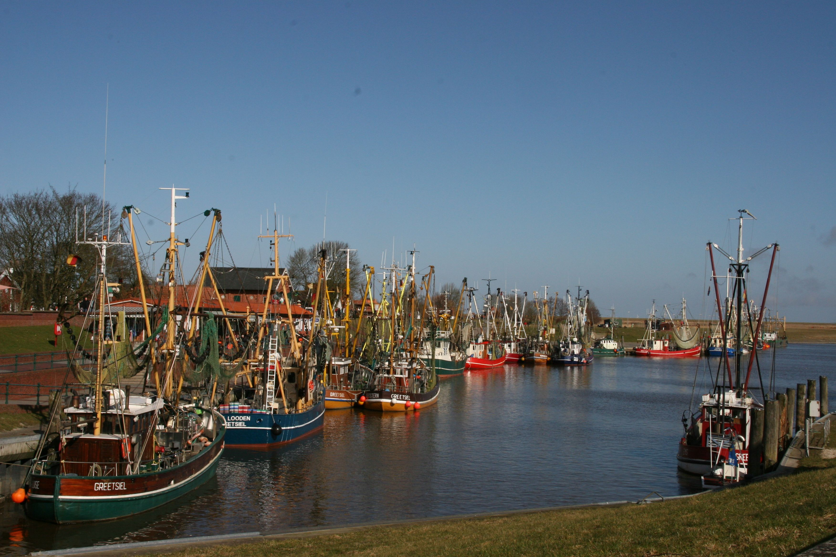 Hafen von Greetsiel